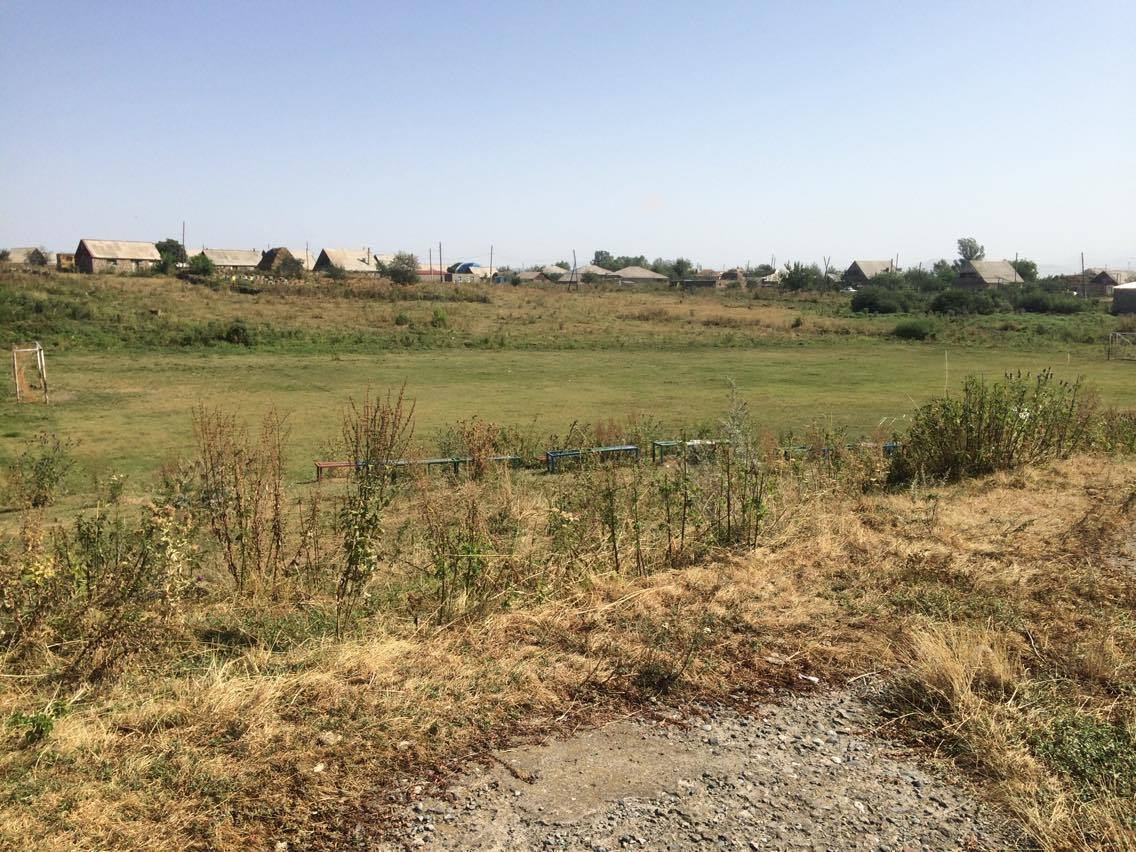 Կաթնառատ, Լոռու մարզ